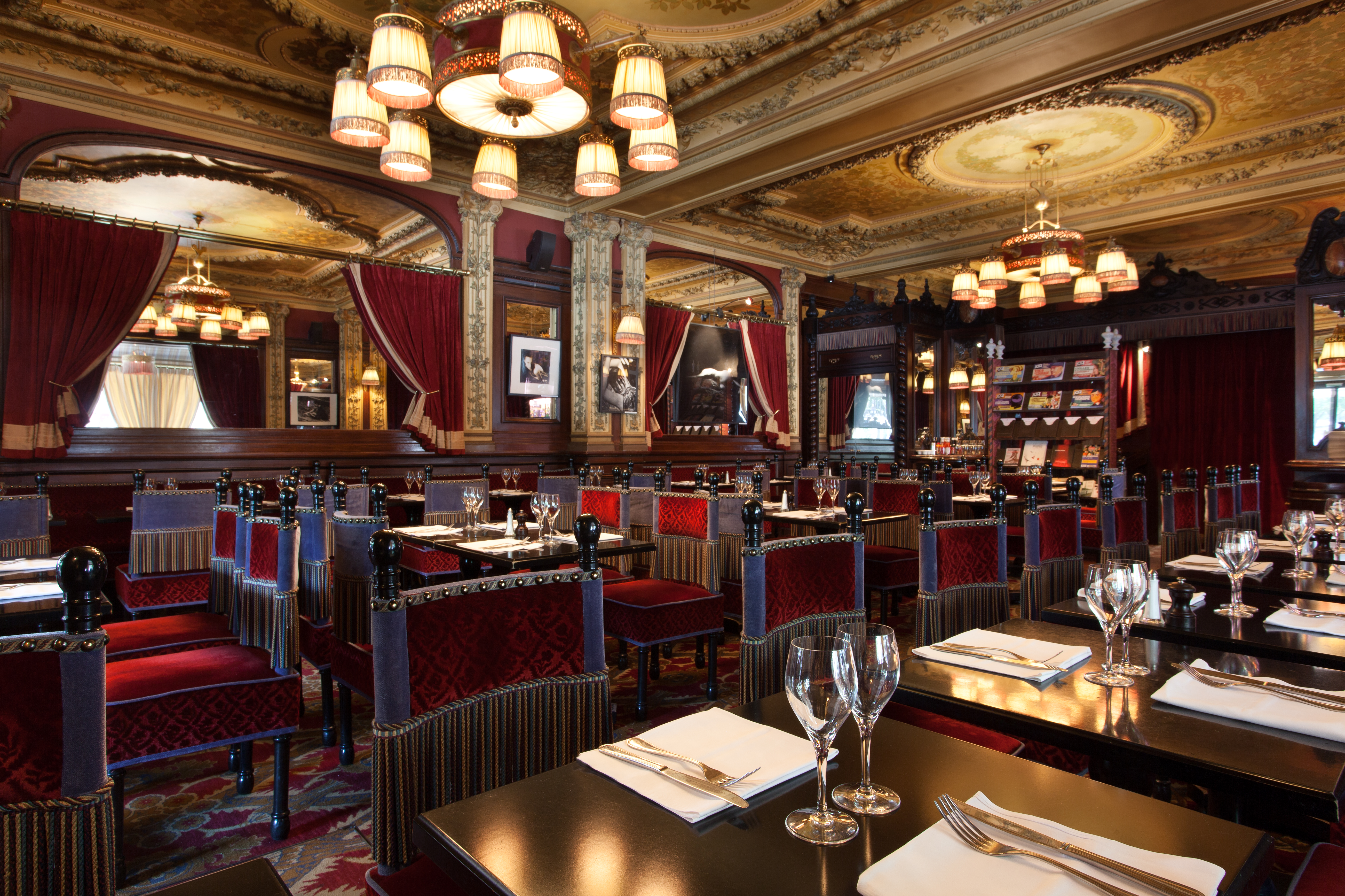 Grande salle principale